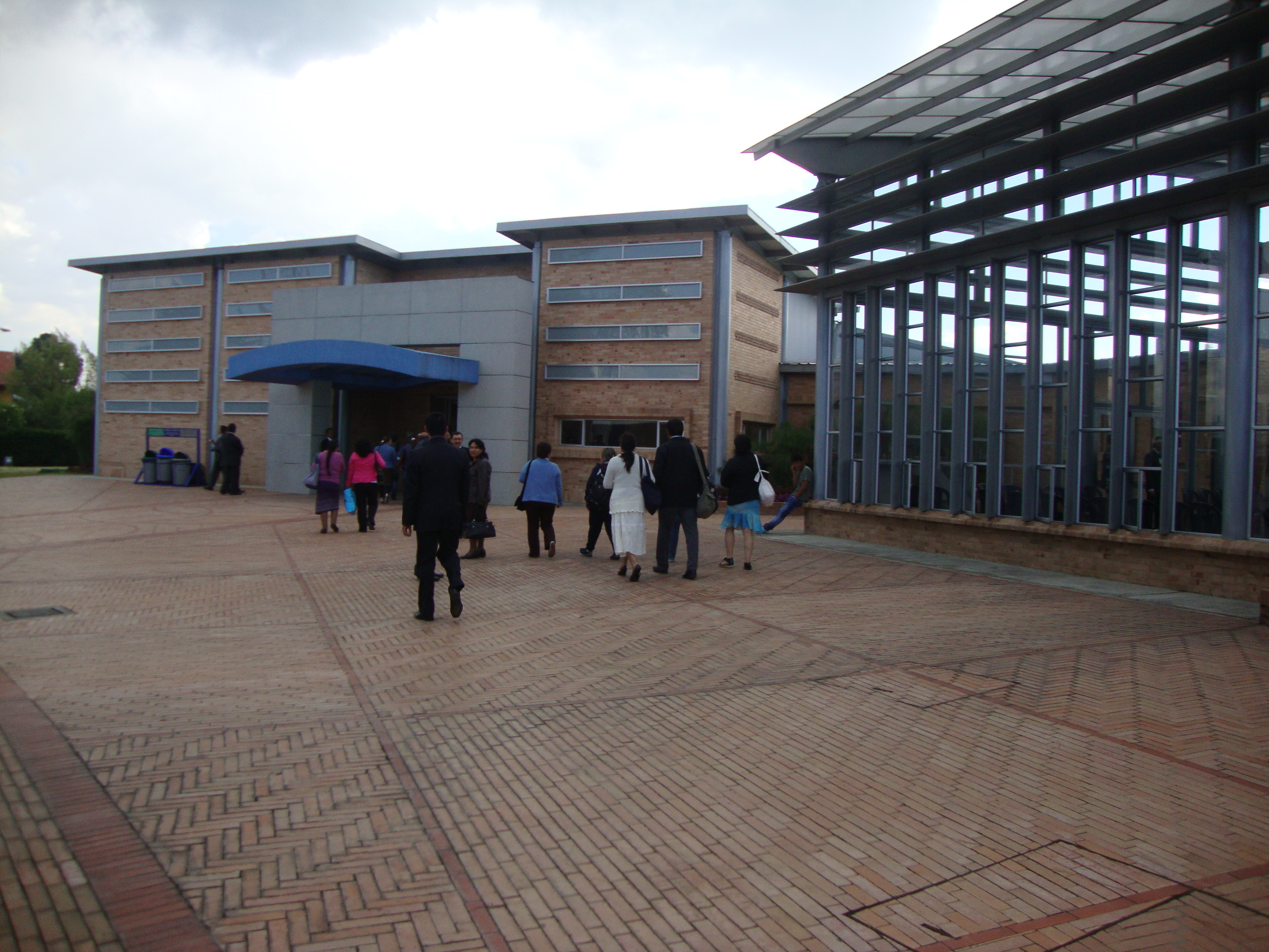 Fachada del Baptisterio de Cota de la Iglesia de Dios Ministerial de Jesucristo Internaconal.